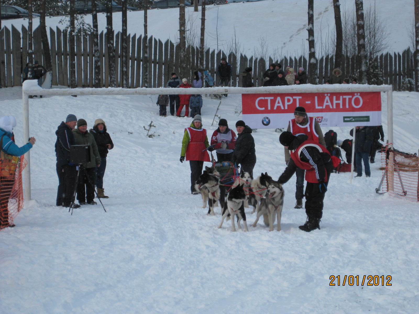 Стартовая линия гонки "По земле Сампо" в посёлке Пряжа Республика Карелия